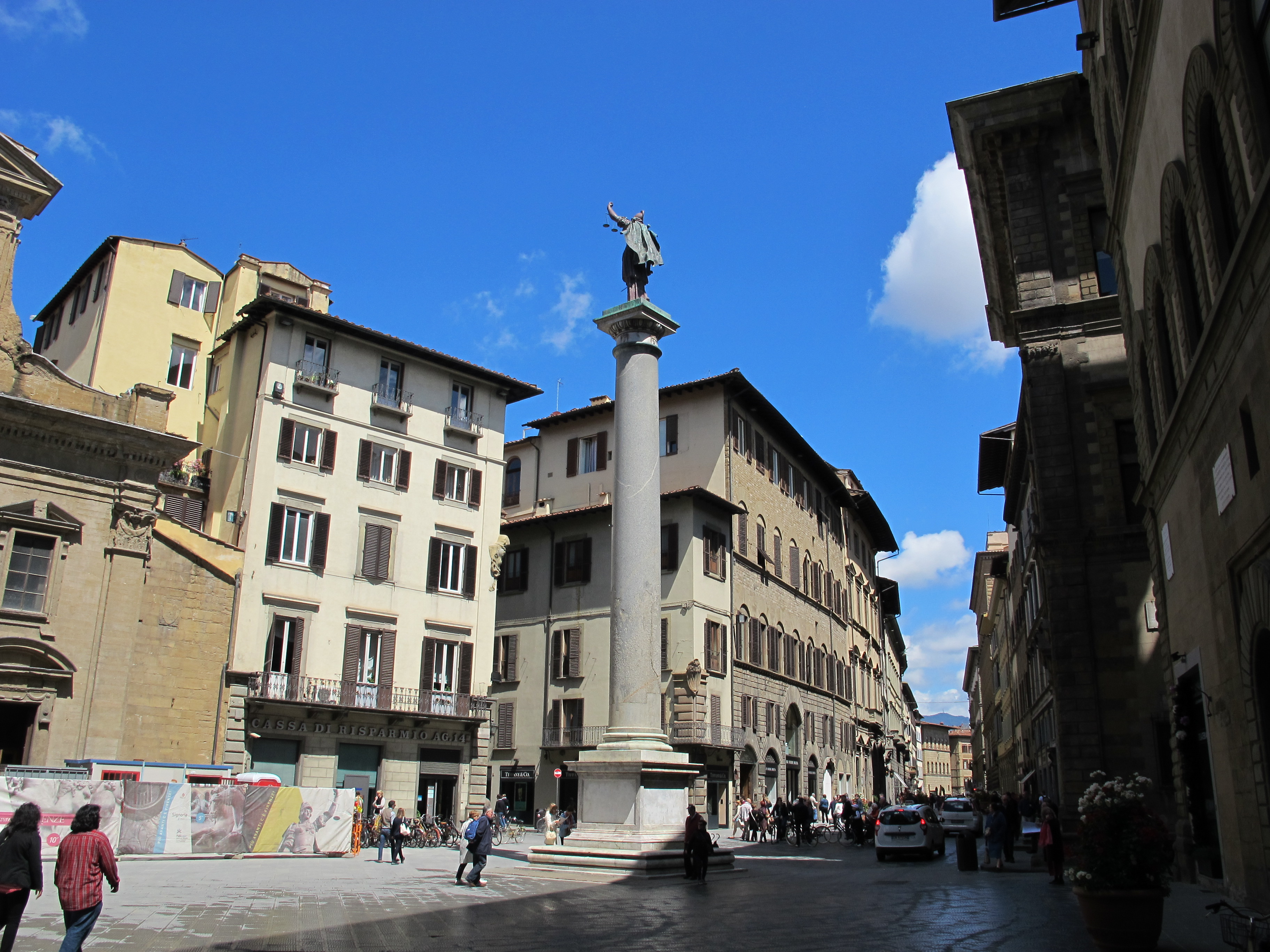 Piazza santa trinità veduta con colonna della giustizia